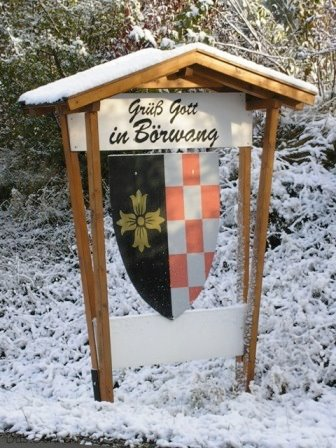 Börwang im Allgäu